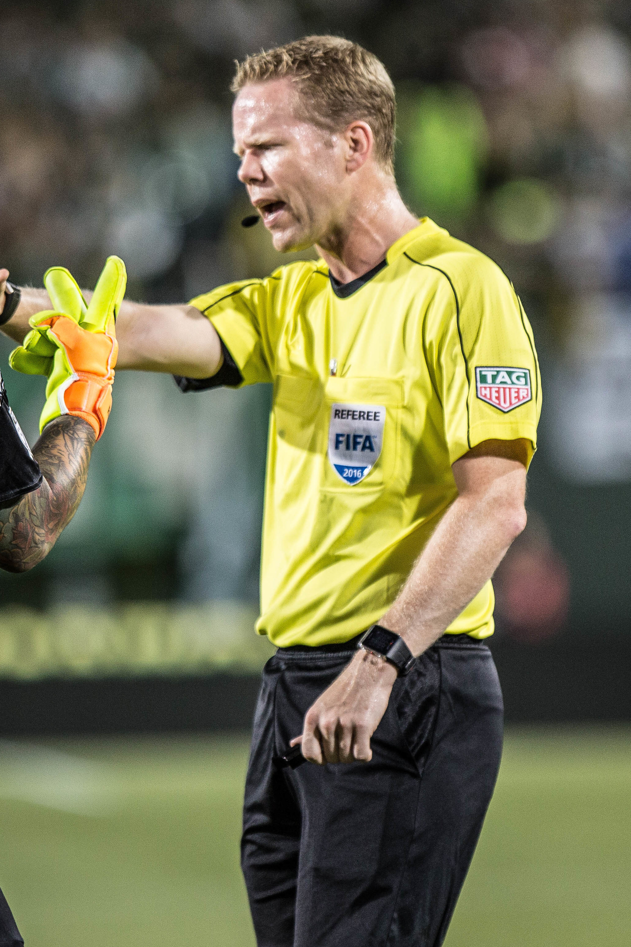 N42A3617.jpg